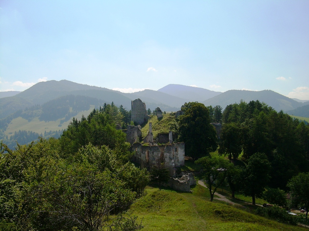 Szklebinya várának romjai